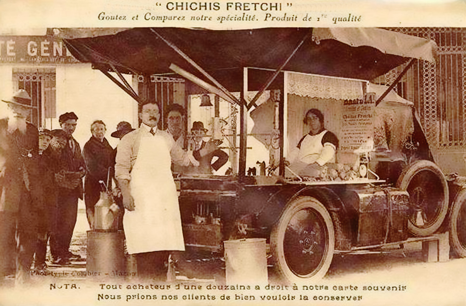 Marchand ambulant de chichis freji